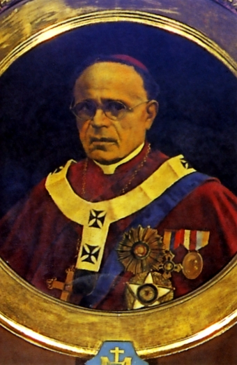 Emilio Lissón Chaves (1872 - 1961) XXVII Arzobispo de Lima.